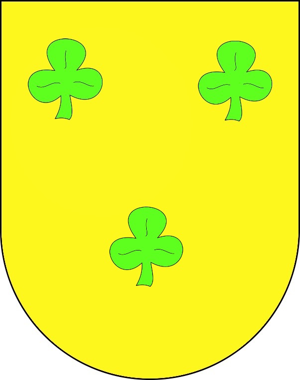 projet d'armoiries communales de Pregny-Chambésy en 1924.